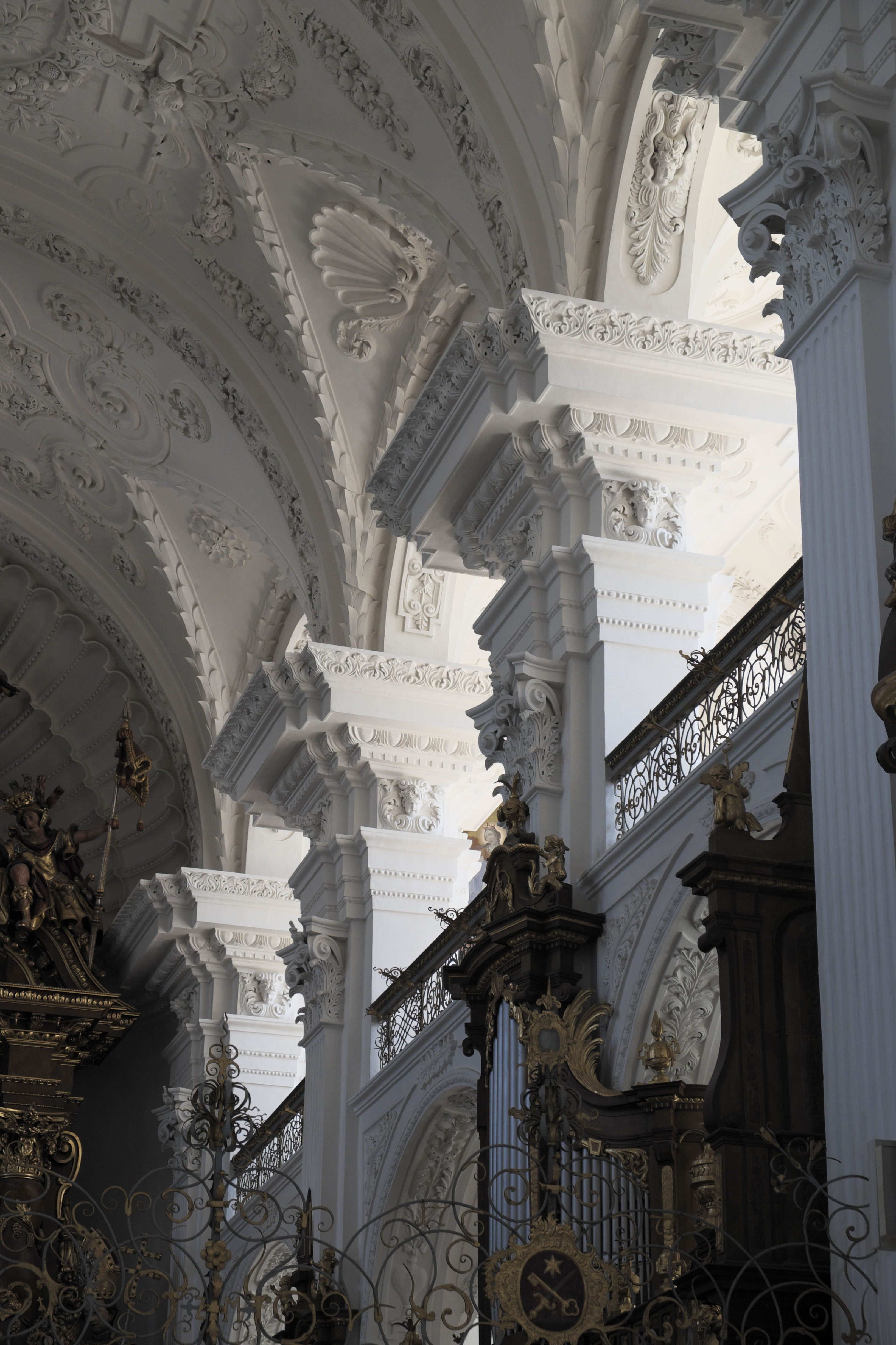 Ehemalige Prämonstratenserstiftskirche, Münster St. Peter und Paul, in Obermarchtal im Alb-Donau-Kreis (Baden-Württemberg/Deutschland), Stuckdekor